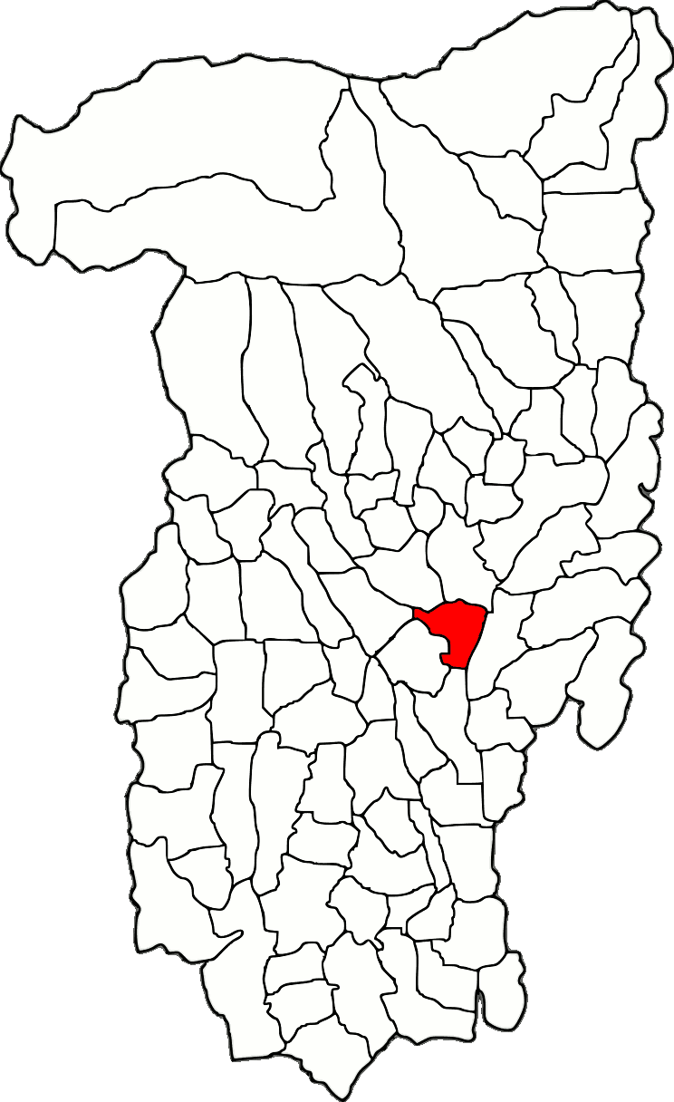 Lage der Stadt Băbeni im Kreis Vâlcea (RO).